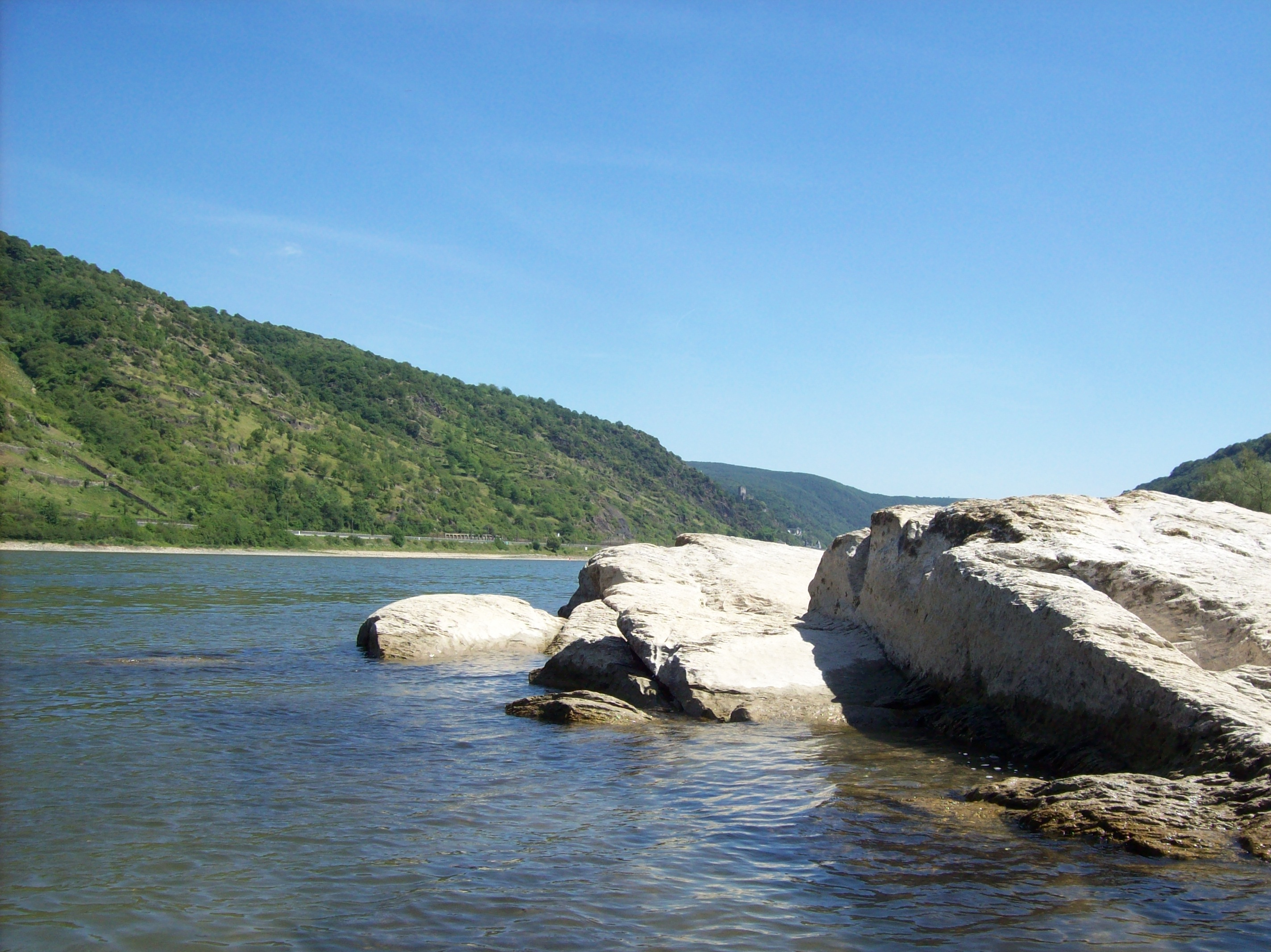 Rabenley bei Oberwesel. Pegel Kaub 93.